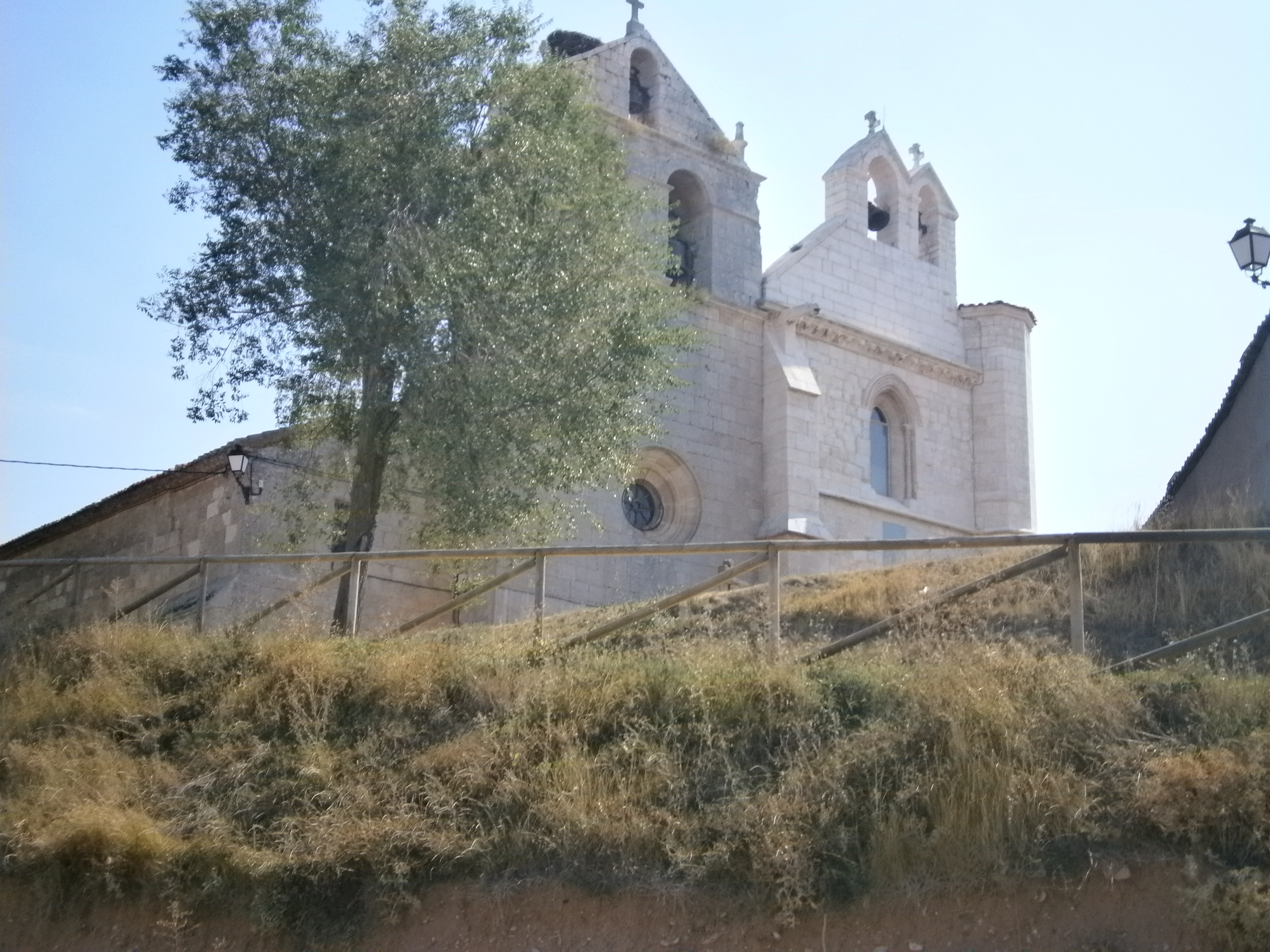 Monasterio de Santa María la Real en Villamayor de los Montes